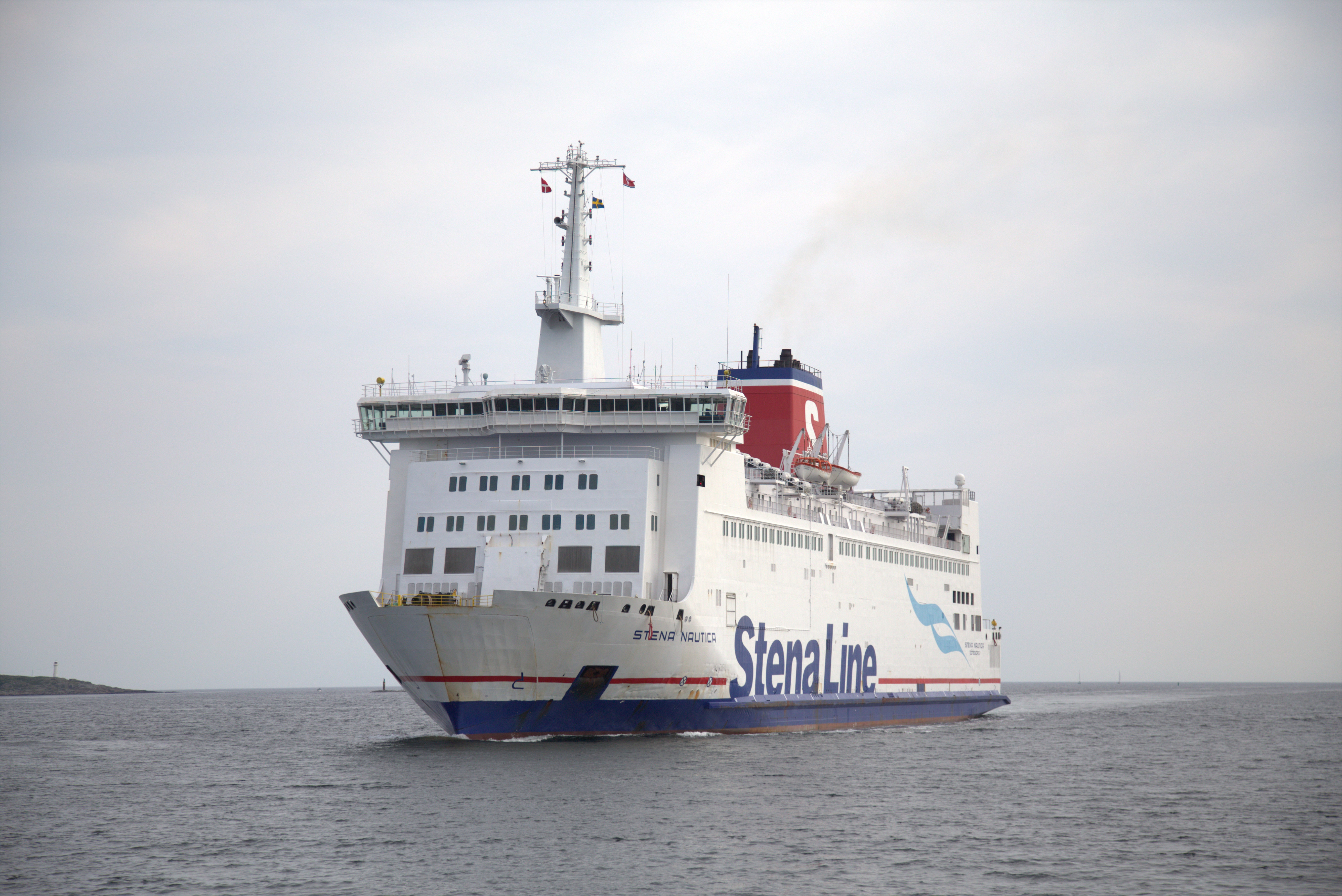 Stena Nautica på väg in i Varbergs hamn.